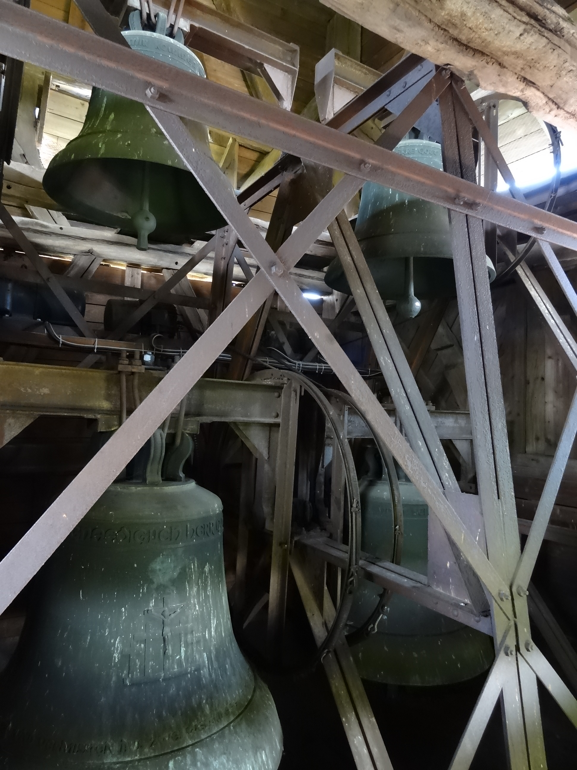 Evangelische Kirche Wohnbach